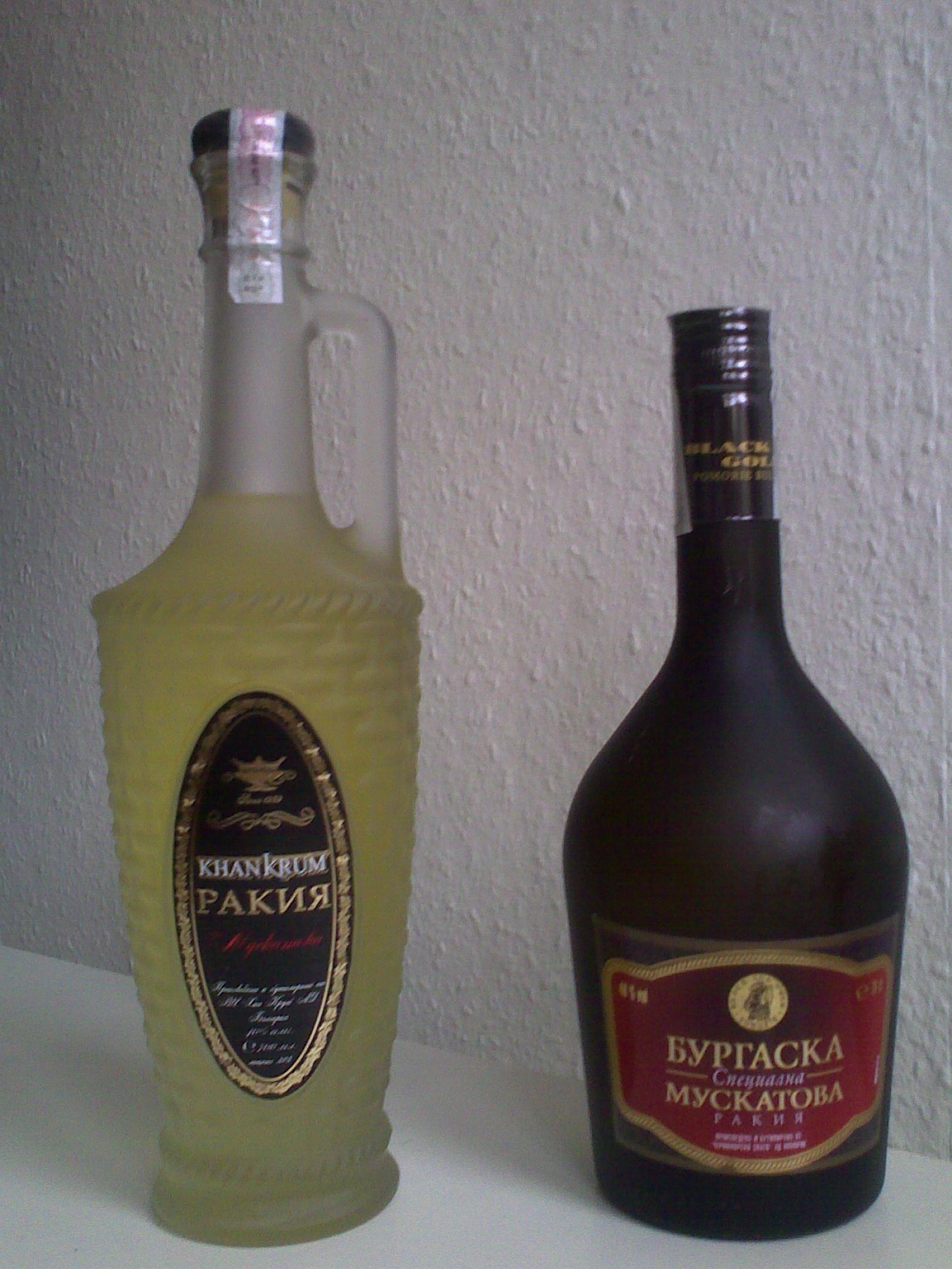 Rakija aus der Rebsorte Muscat aus Bulgarien: Han Krum Muskatova Rakija und Burgas Muskatova Rakija Spezialna